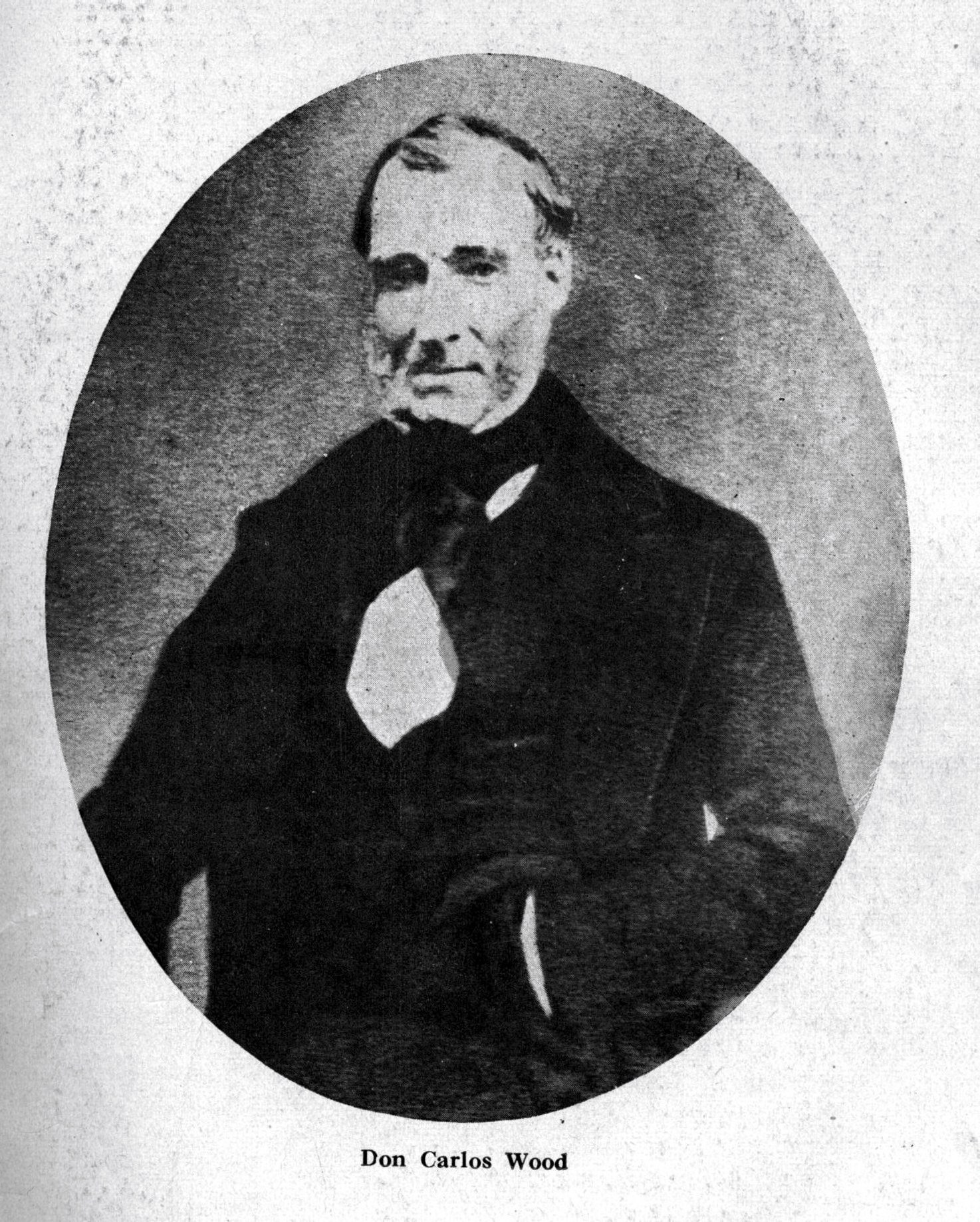 Retrato del Pintor Charles C. Wood Taylor